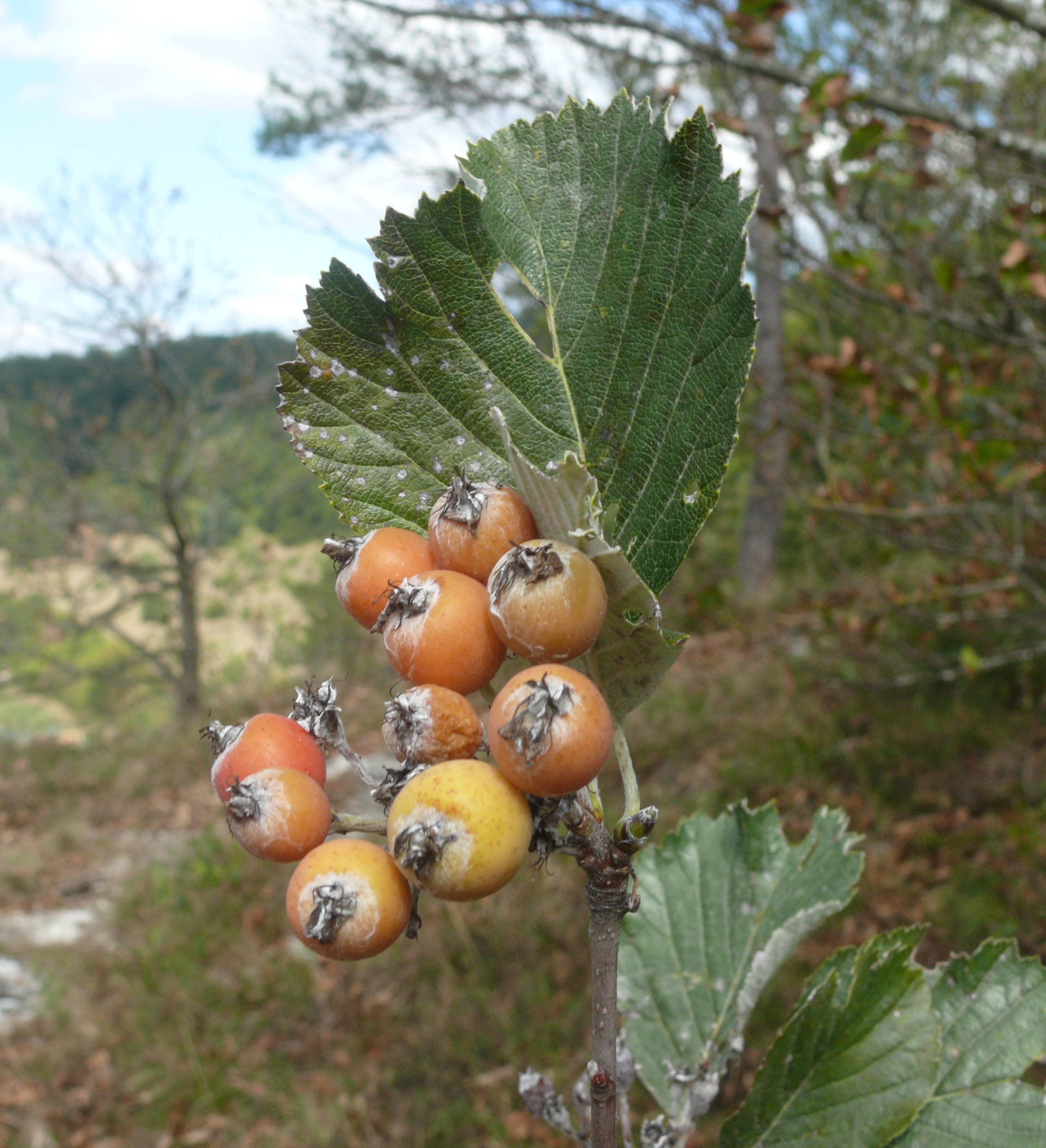 Sorbus danubialis, Altmühltal